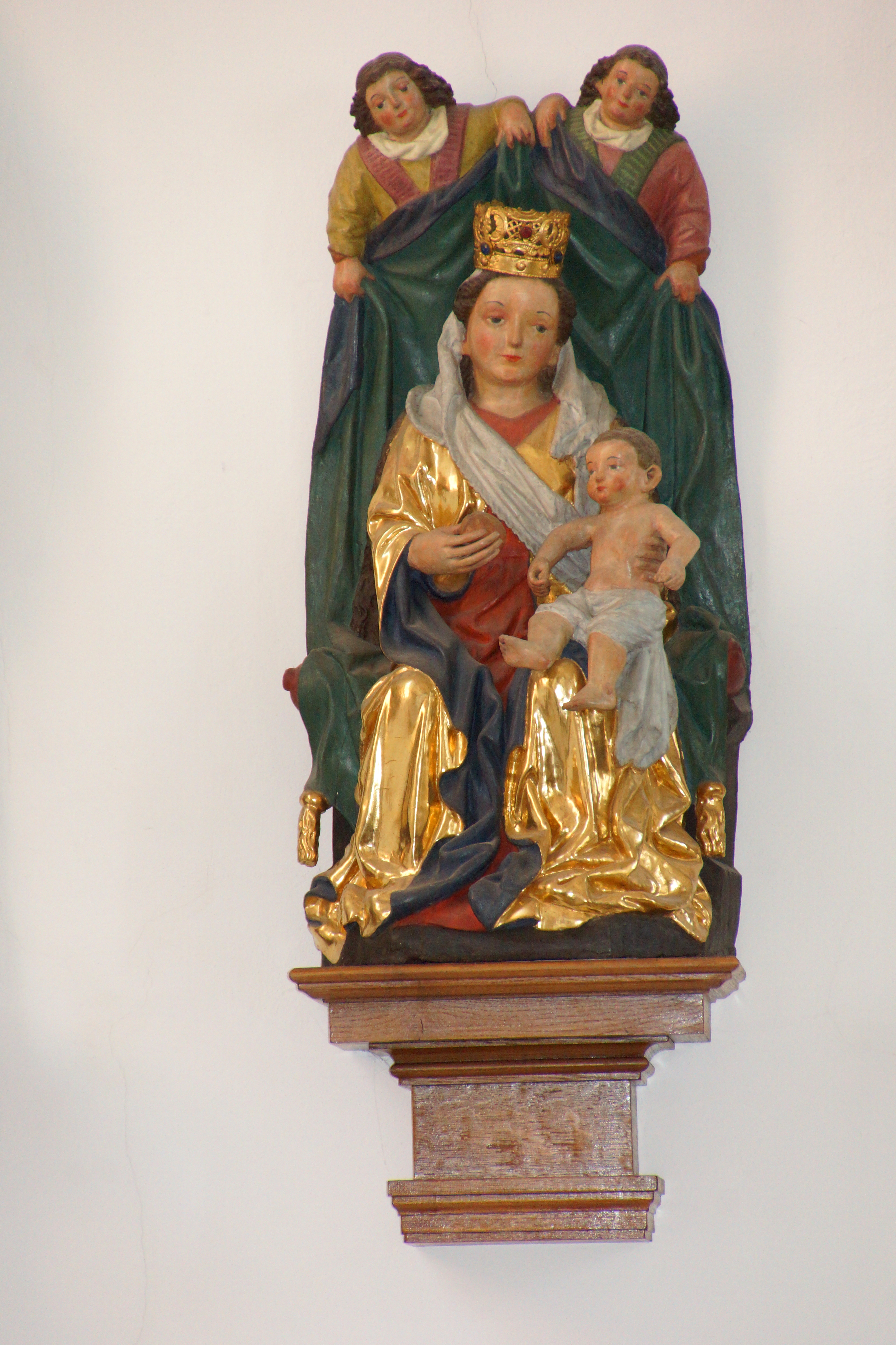 Die Pfarrkirche St. Barbara in Abendsberg